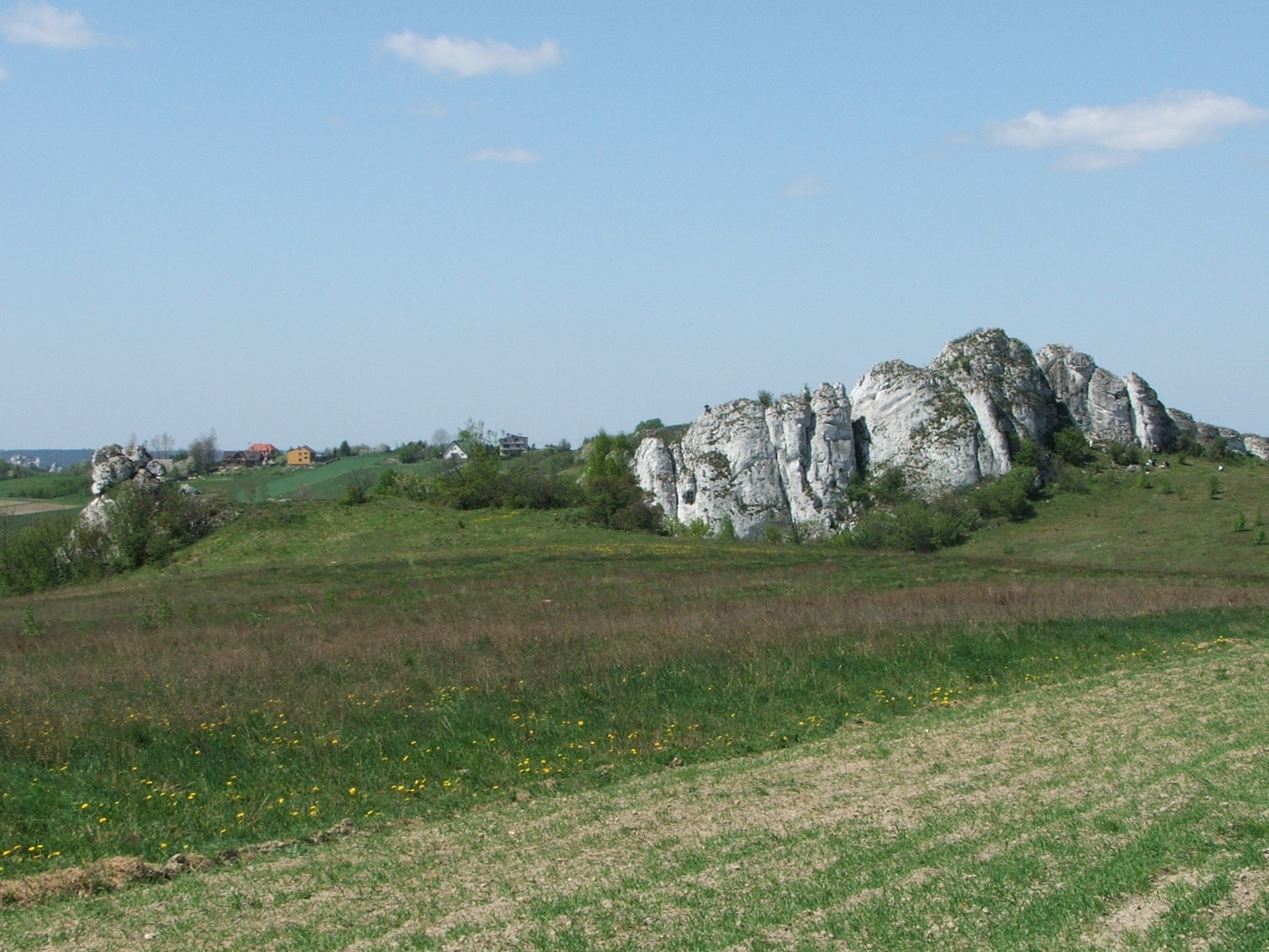 Cielęca Skała i Łysa (Fiala)